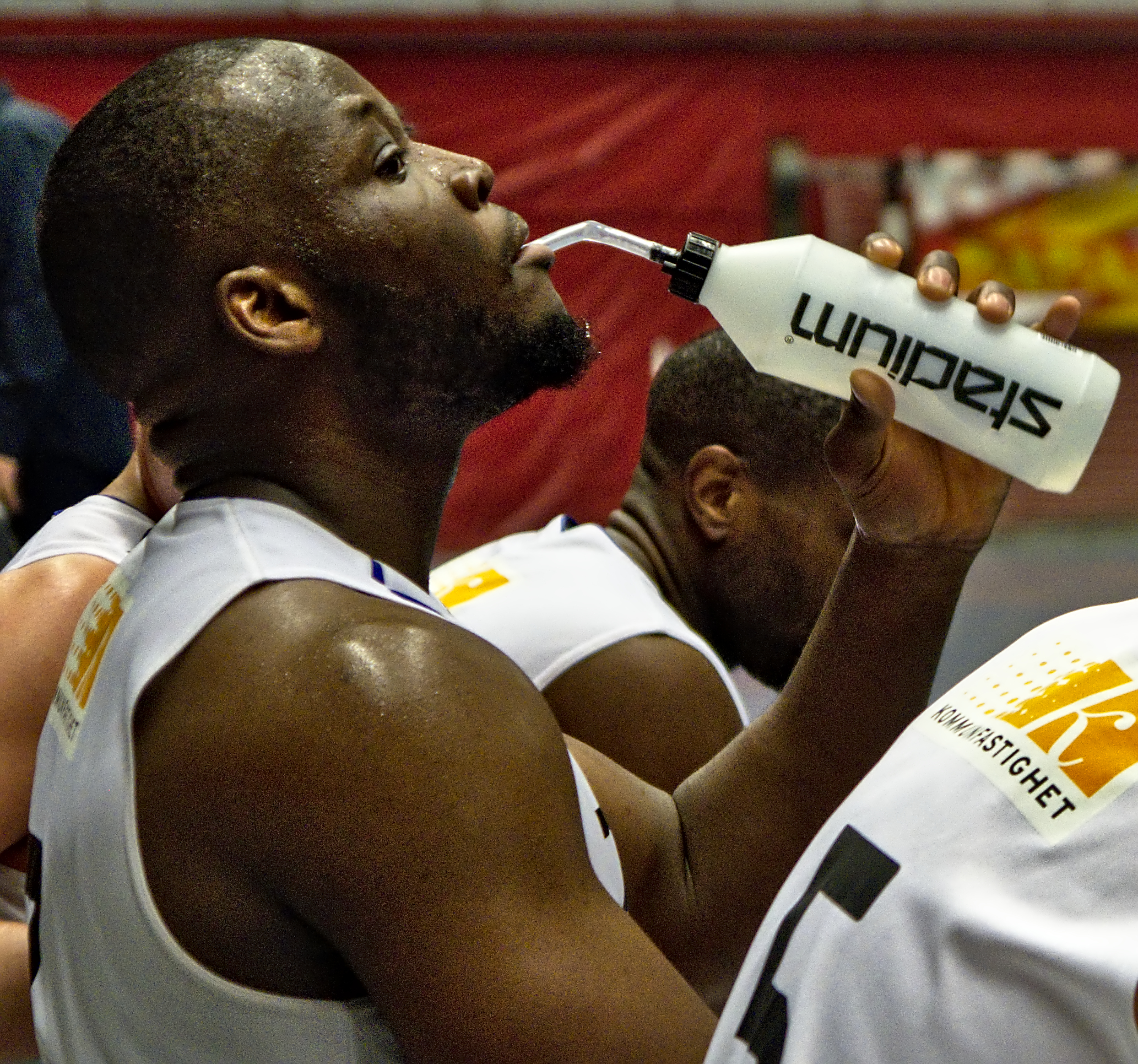 Eskilstuna Basket-KFUM Central, 2016-03-05 i Eskilstuna sporthall. Match i Basketettans fortsättningsserie Superettan.